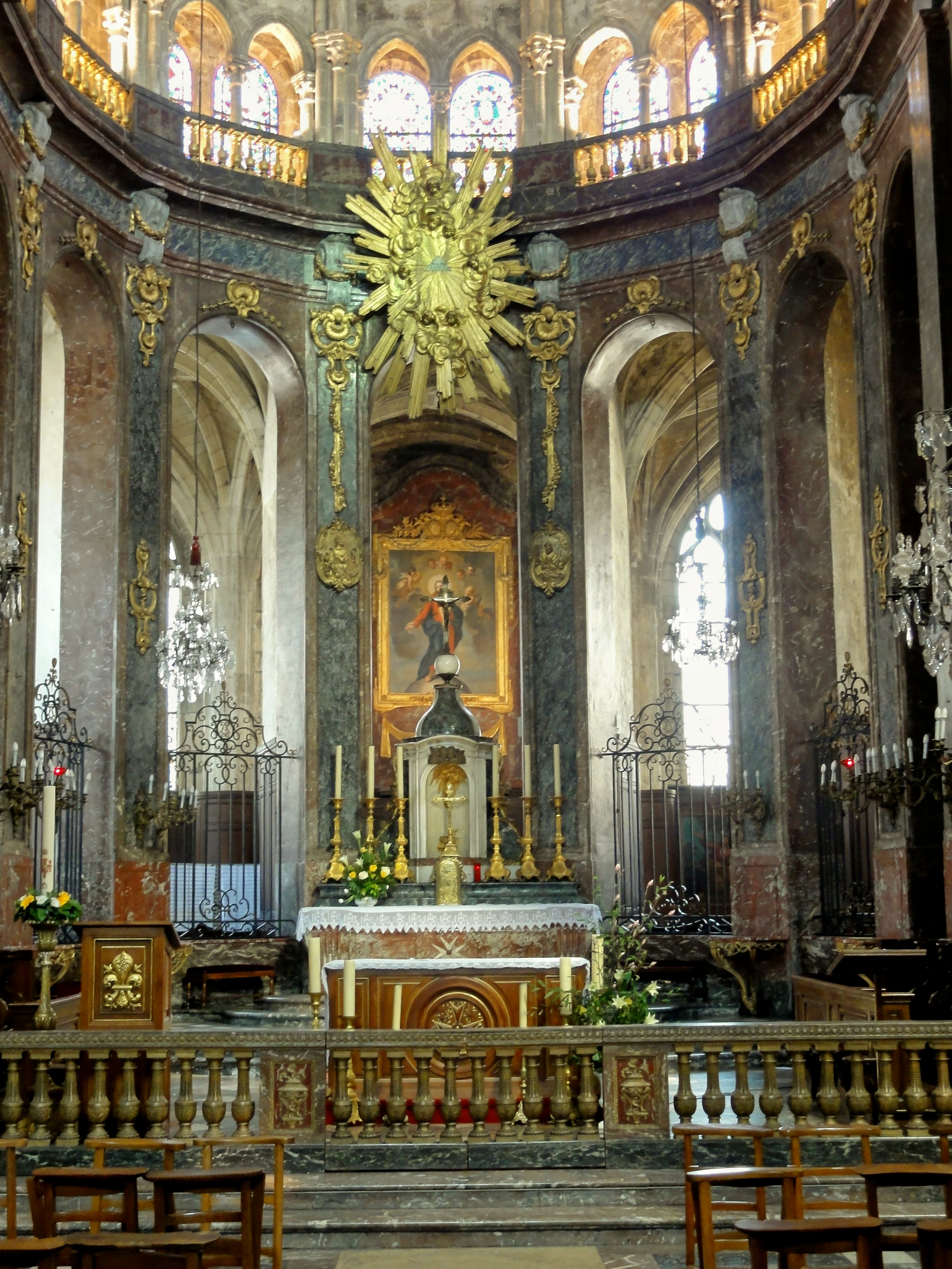 Maître-autel (en arrière-plan), en marbre rouge, de 1773 / 1774.